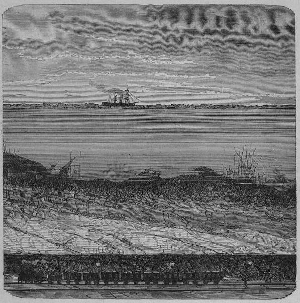 Gravure sur le tunnel sous la Manche